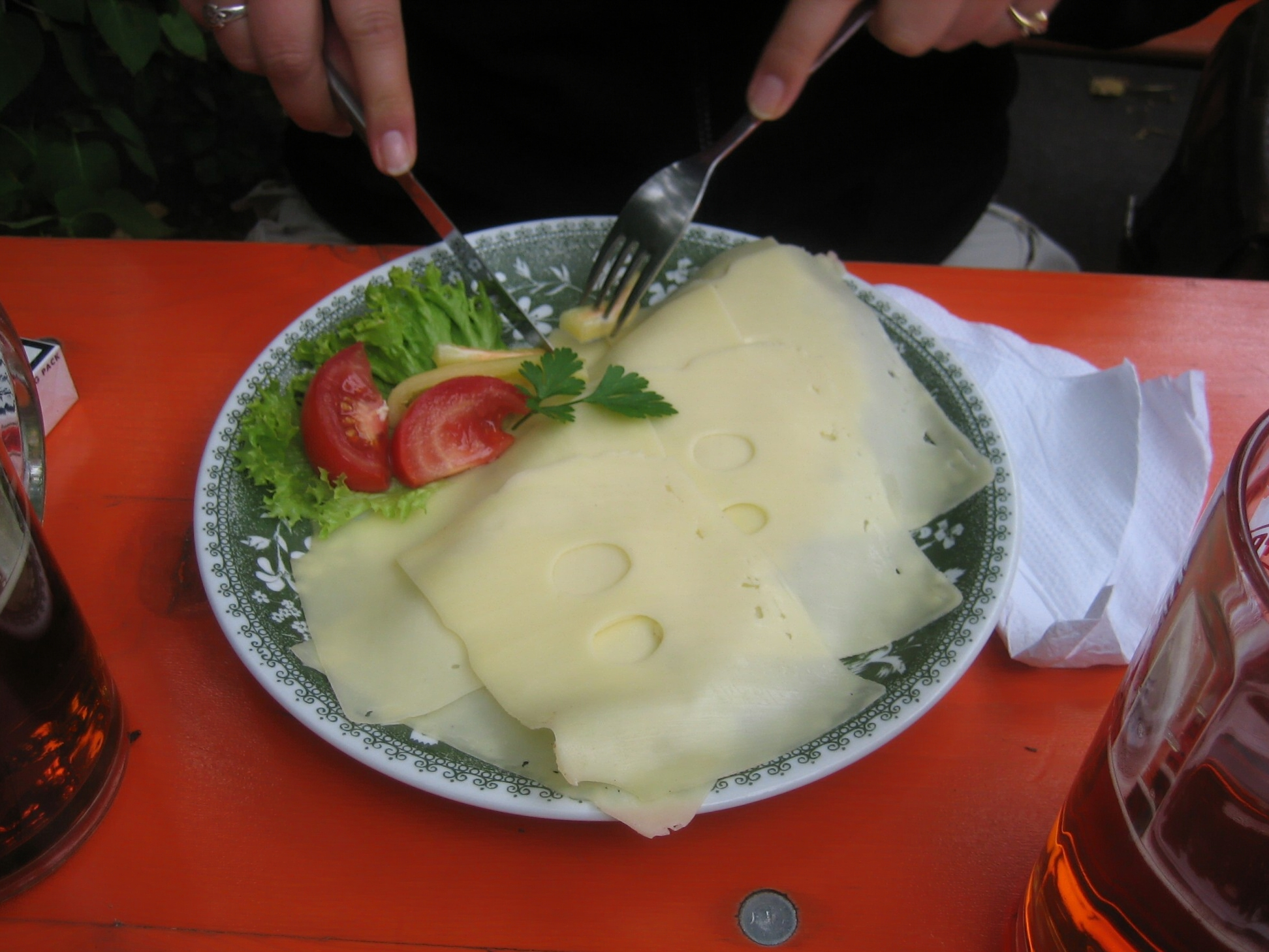 Ein Käsebrot, hier als einfaches Brotgericht aus dem Angebot eines Biergartens (in der Fränkischen Schweiz).